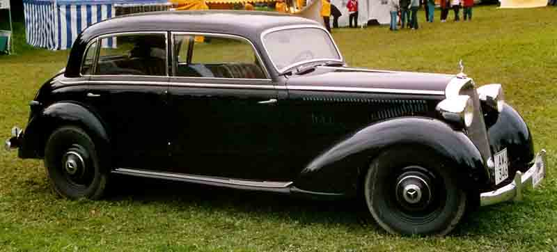 Mercedes-Benz 230 Limousine 1939